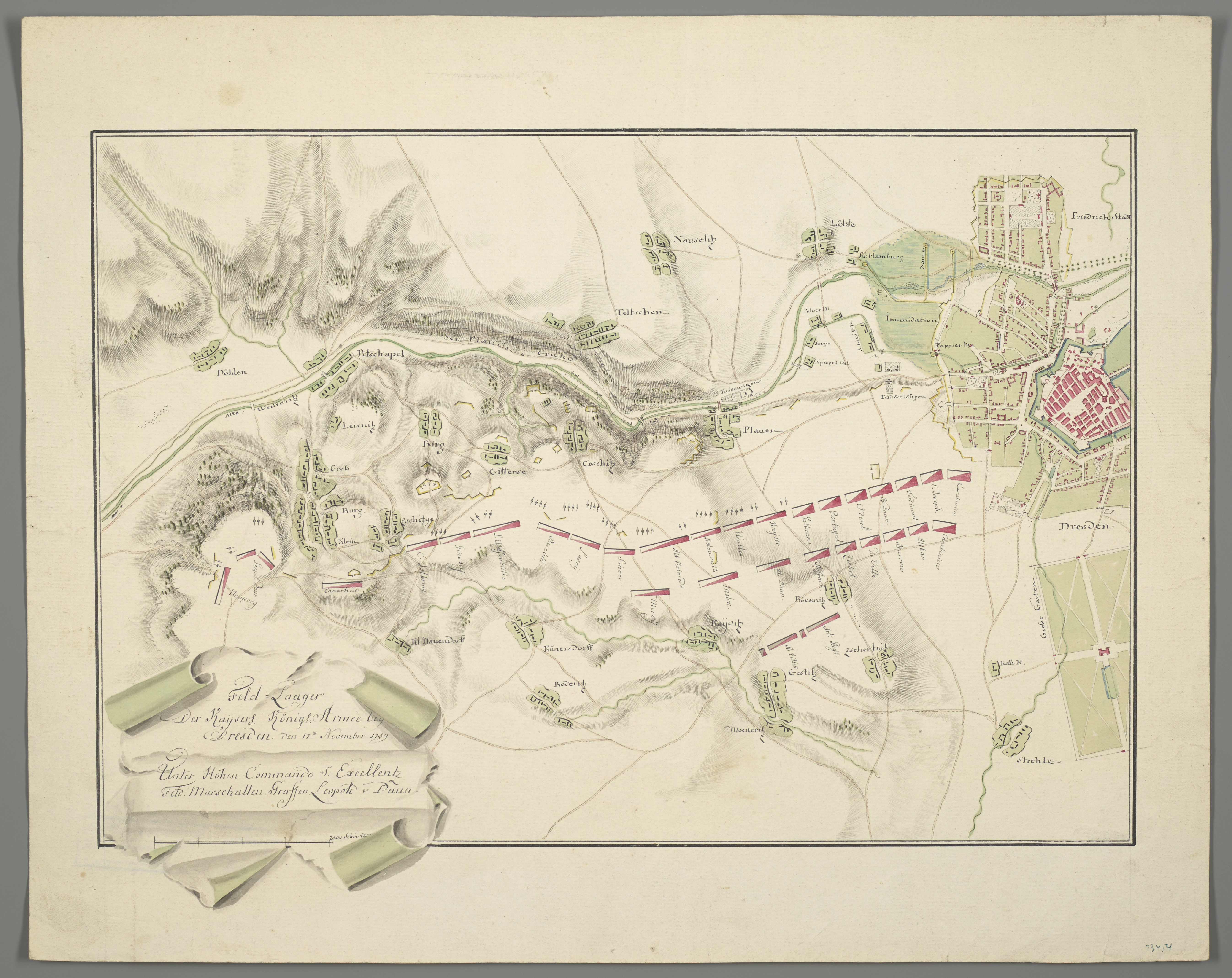 1 Kt. : teilw. kolor. (37 x 26 cm) ; Koordinaten E 13°41'18"/N 50°58'33" ; E 13°37'50"/N 51°00'52" ; E 13°43'08"/N 51°03'59" ; E 13°46'36"/N 51°01'40" ; E 13°41'18"/N 50°58'33" ; Handzeichnung. - Maßstab in graph. Form (Schritt). - Titelkartusche und Maßstab unten links. - Mit Truppenstellungen mit Namen der Kommandanten. - Relief: Schraffen